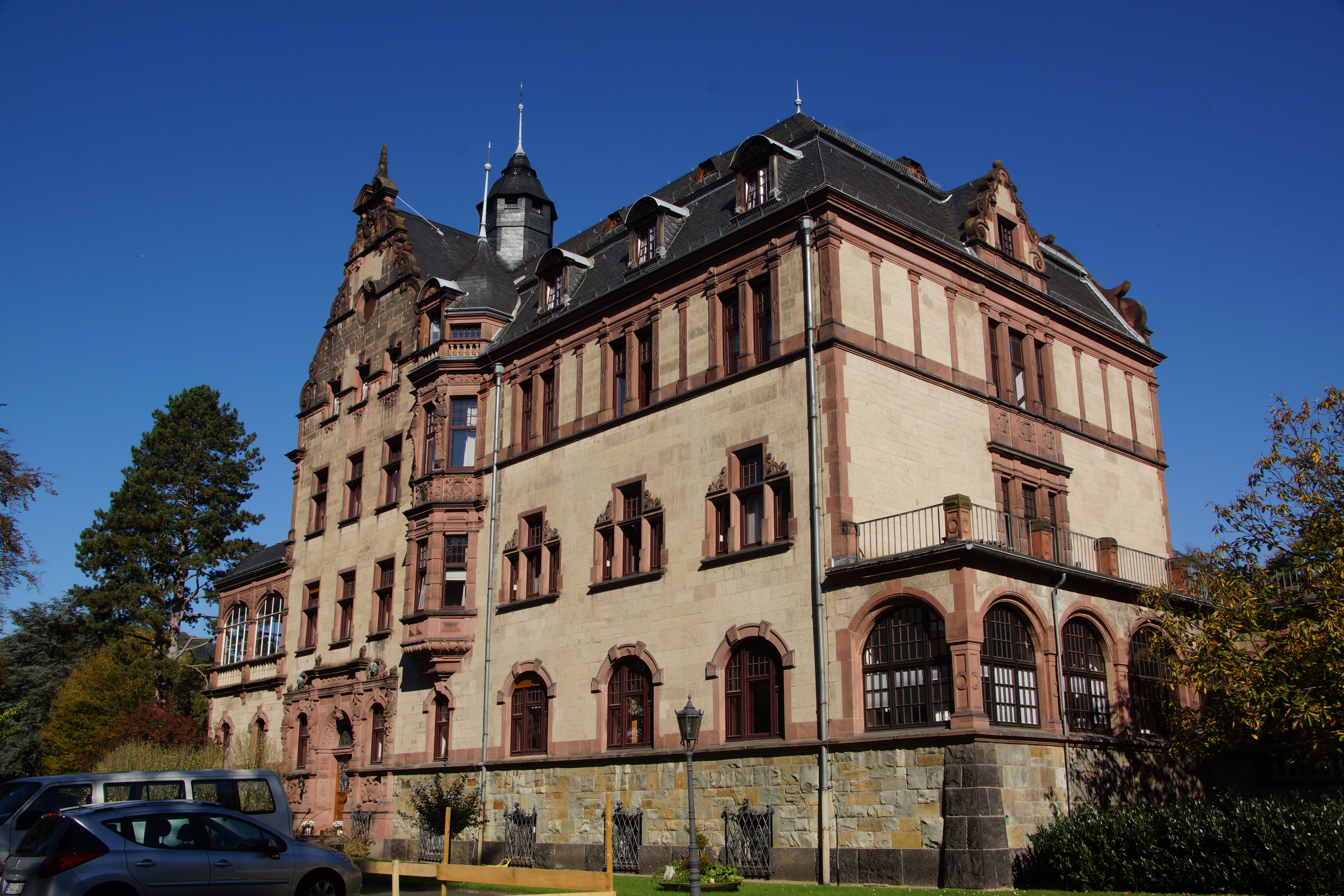 Hölterhoffstift, Hauptstraße 5, Bad Honnef: Hauptgebäude